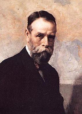 George Stephen, 1st Baron Mount Stephen (1829-1921)